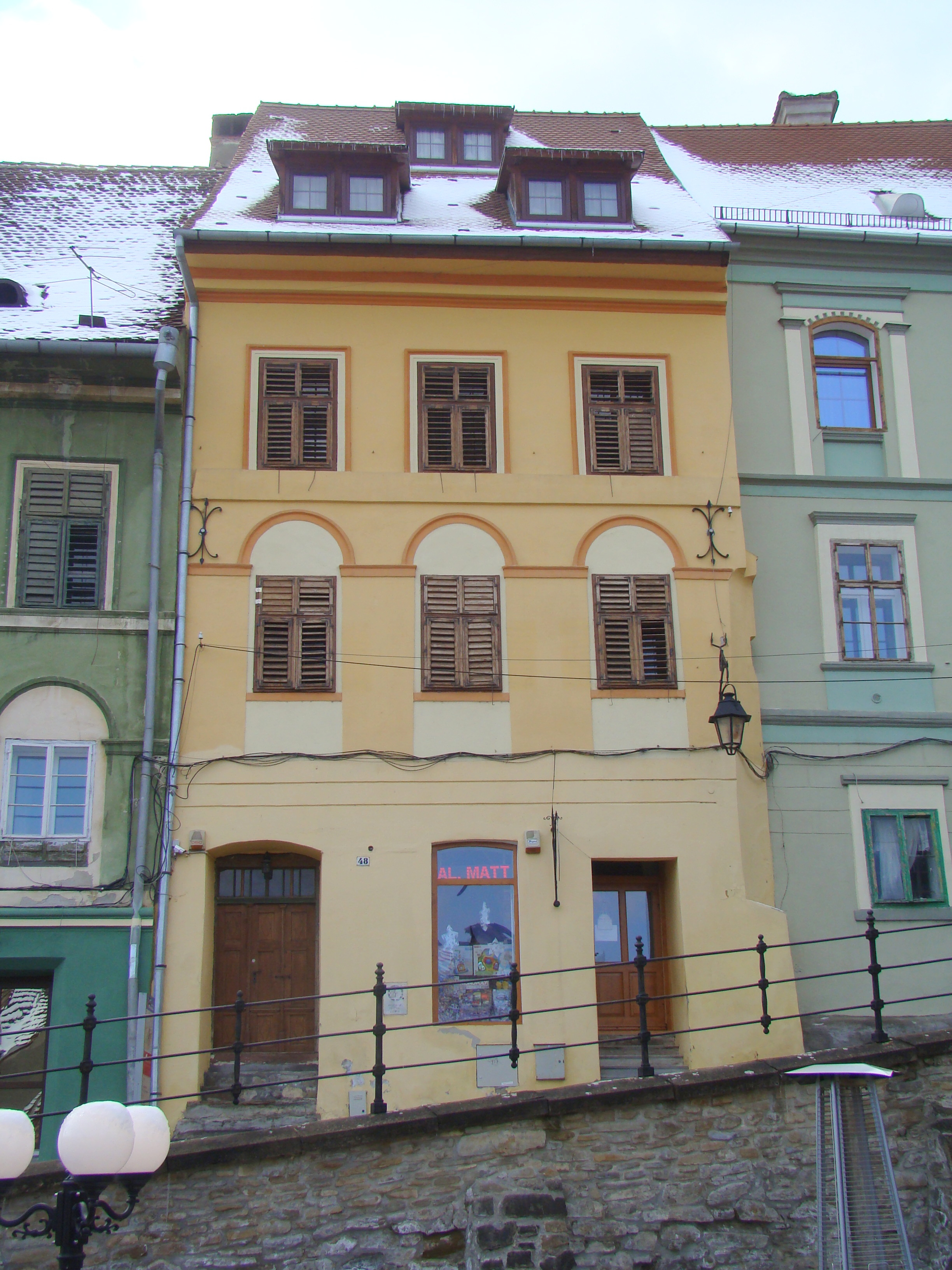 Casa Kroner, municipiul Sighișoara, Piața Oberth Hermann 48 sec. XVI, modif. sec. XVIII